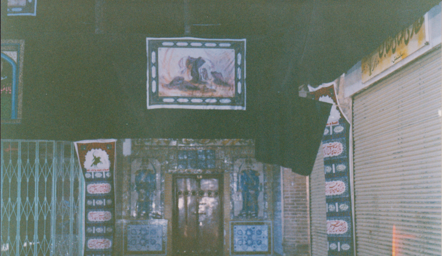 روبروی موزه شهری - ملی ، سمنان، در داخل مسجد جامع